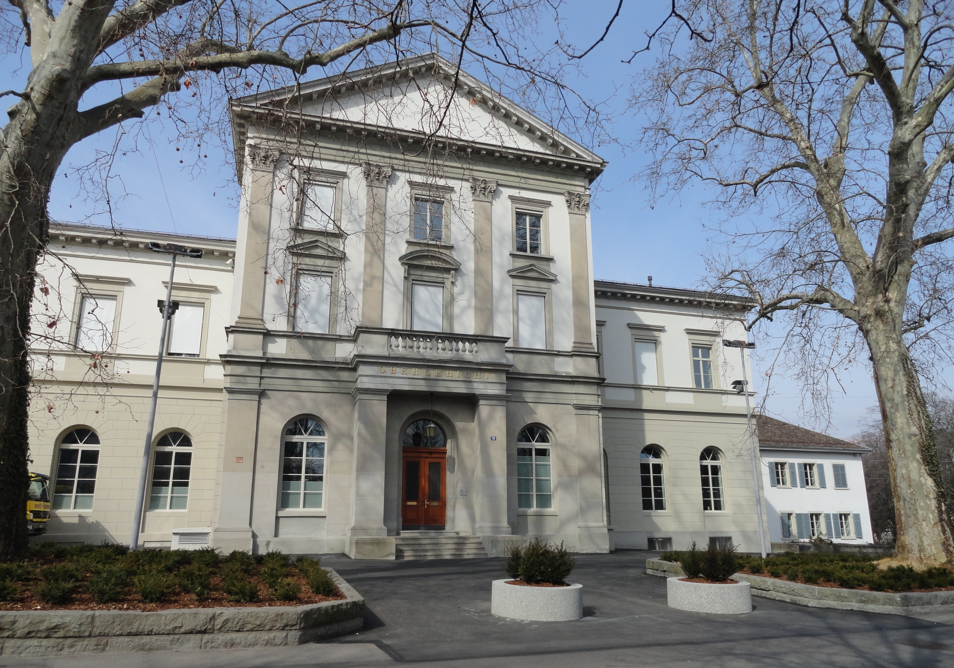 Zürcher Obergericht